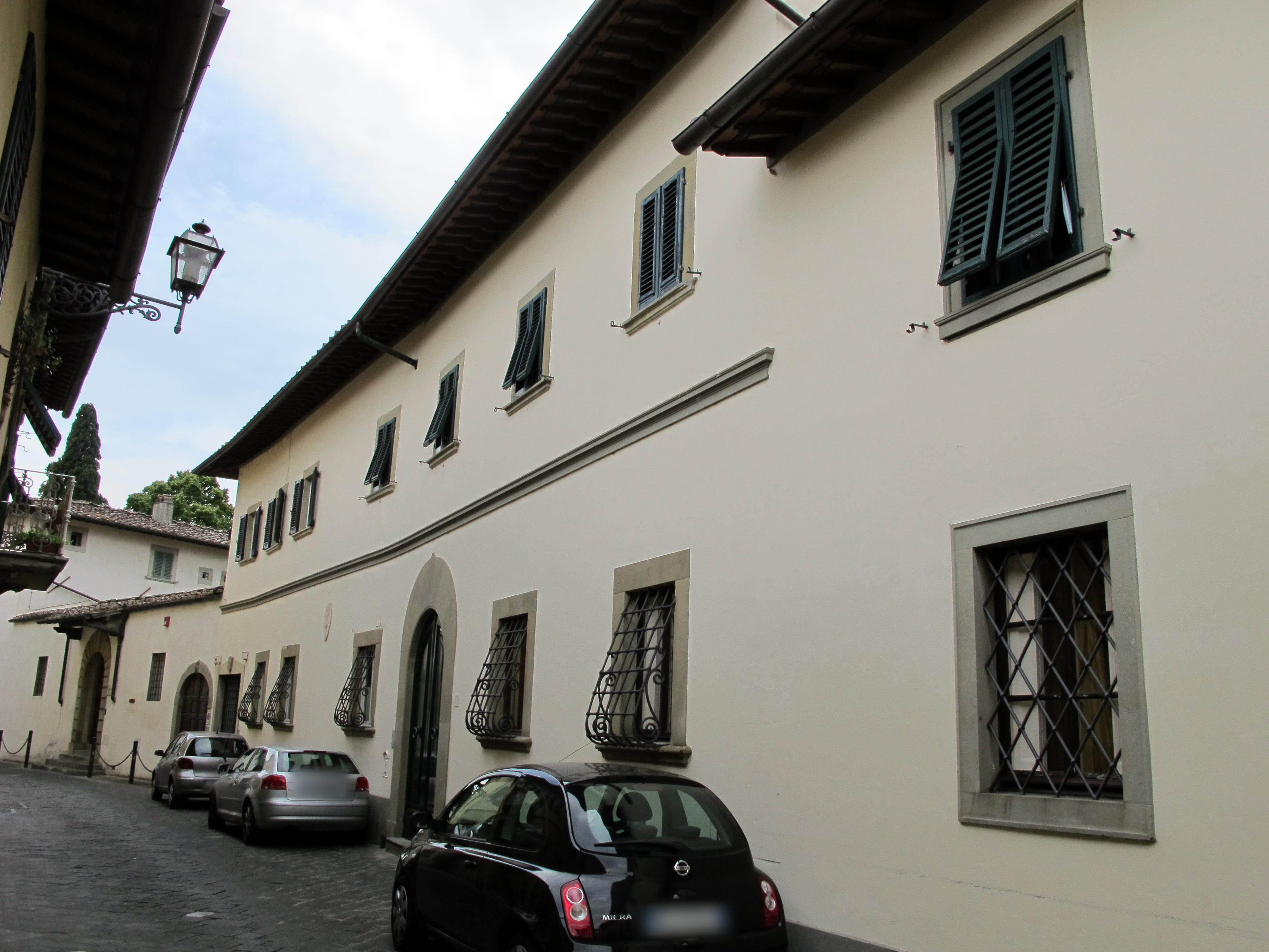 Zona di Pian dei Giuallari, Firenze